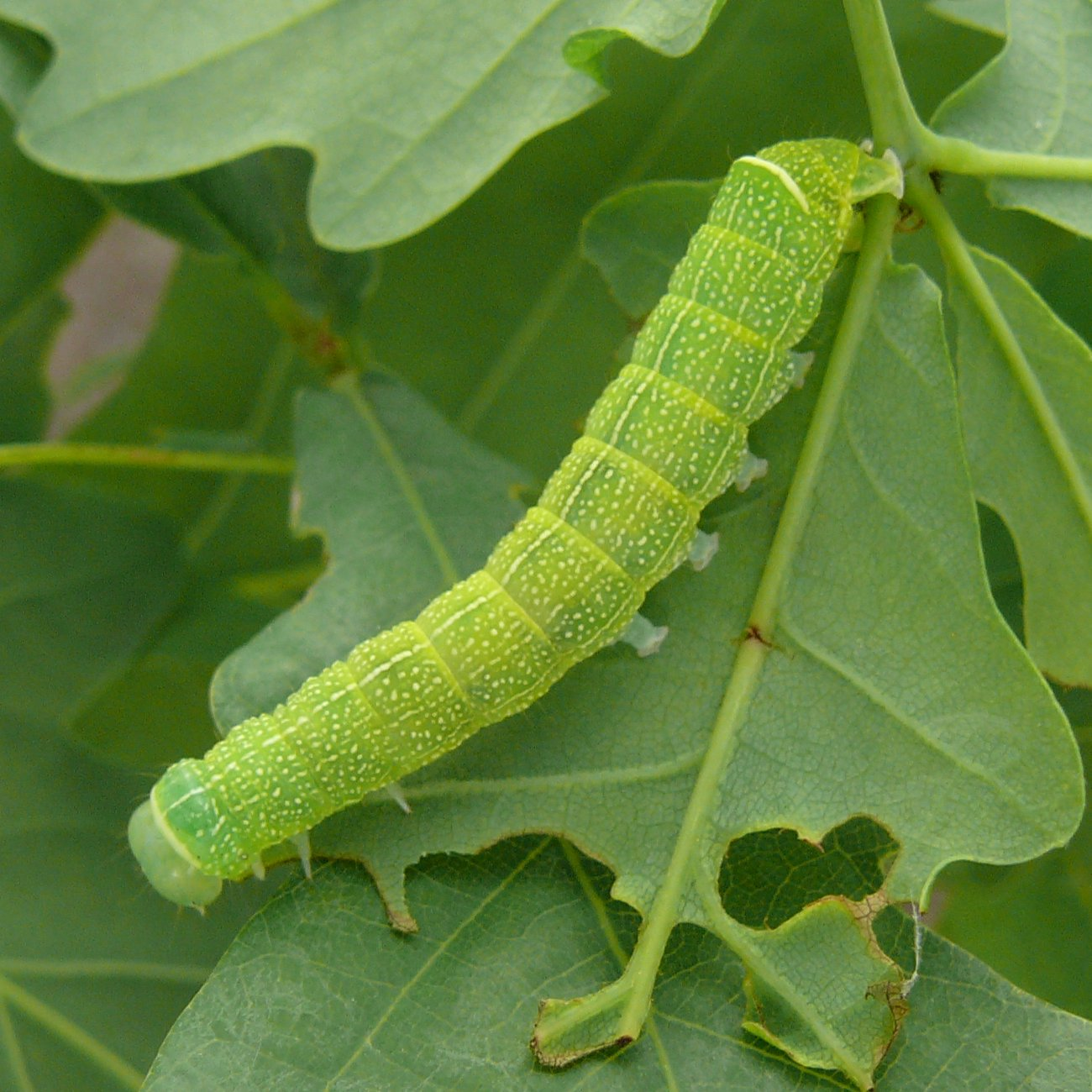 Orthosia cerasi (Fabricius, 1775)